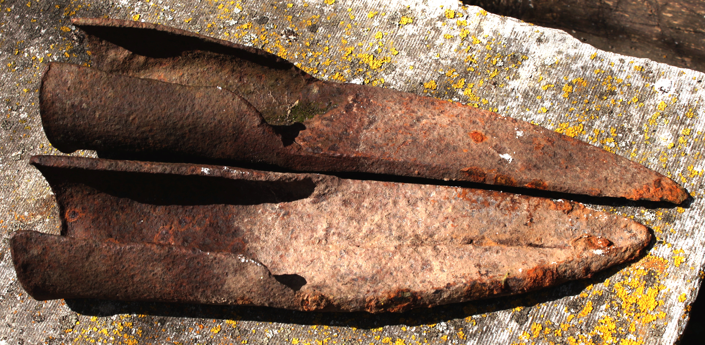 Металлические сошники от деревянной сохи. Беларусь. Витебская обл.